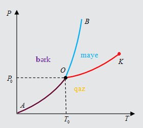 Faza diaqramı